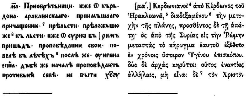 Приобретьници в книге Бенешевич В. Н. Древнеславянская кормчая XIV титулов без толкования. СПб, 1907.Т. 1.